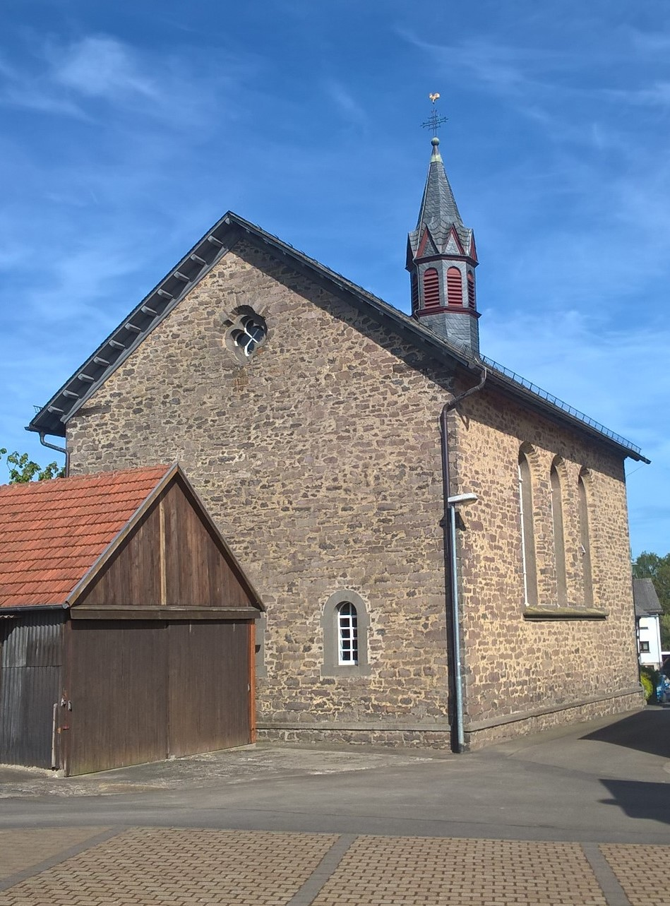 Evangelische Kirche Lumda, Grünberg, Landkreis Gießen, Hessen, Deutschland